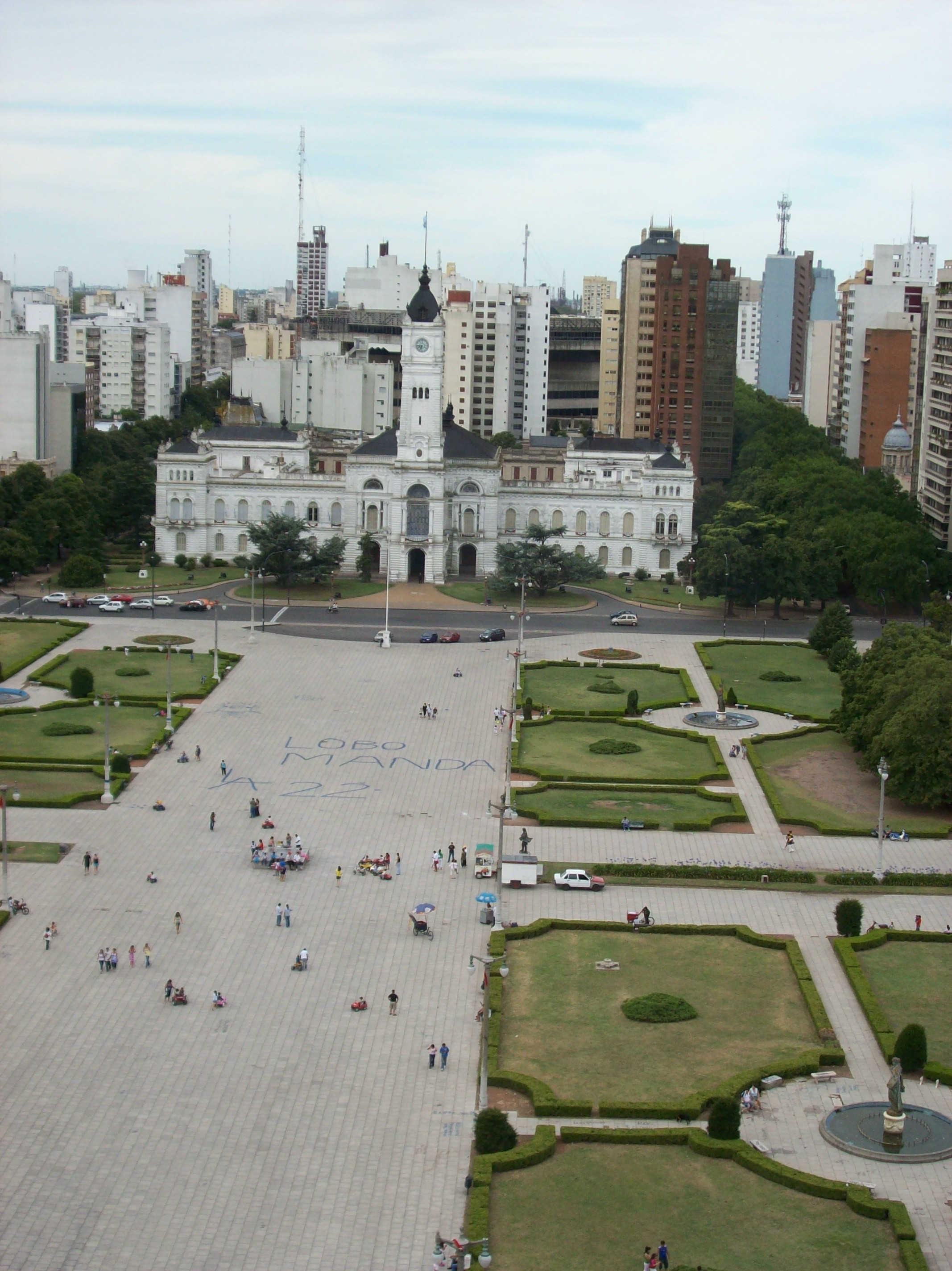 Municipalidad de La Plata y Plaza Moreno desde la Torre de Jesús de la Catedral de La Plata, a 42 m de altura.